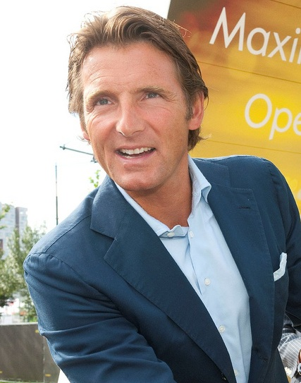 Maurits van Oranje-Nassau, van Vollenhoven